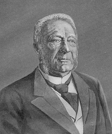 Gaston Boissier (1823–1908), französischer Altphilologe. Stich von P. Gusman (aus Mélanges Boissier, A. Fontemoing-Paris).